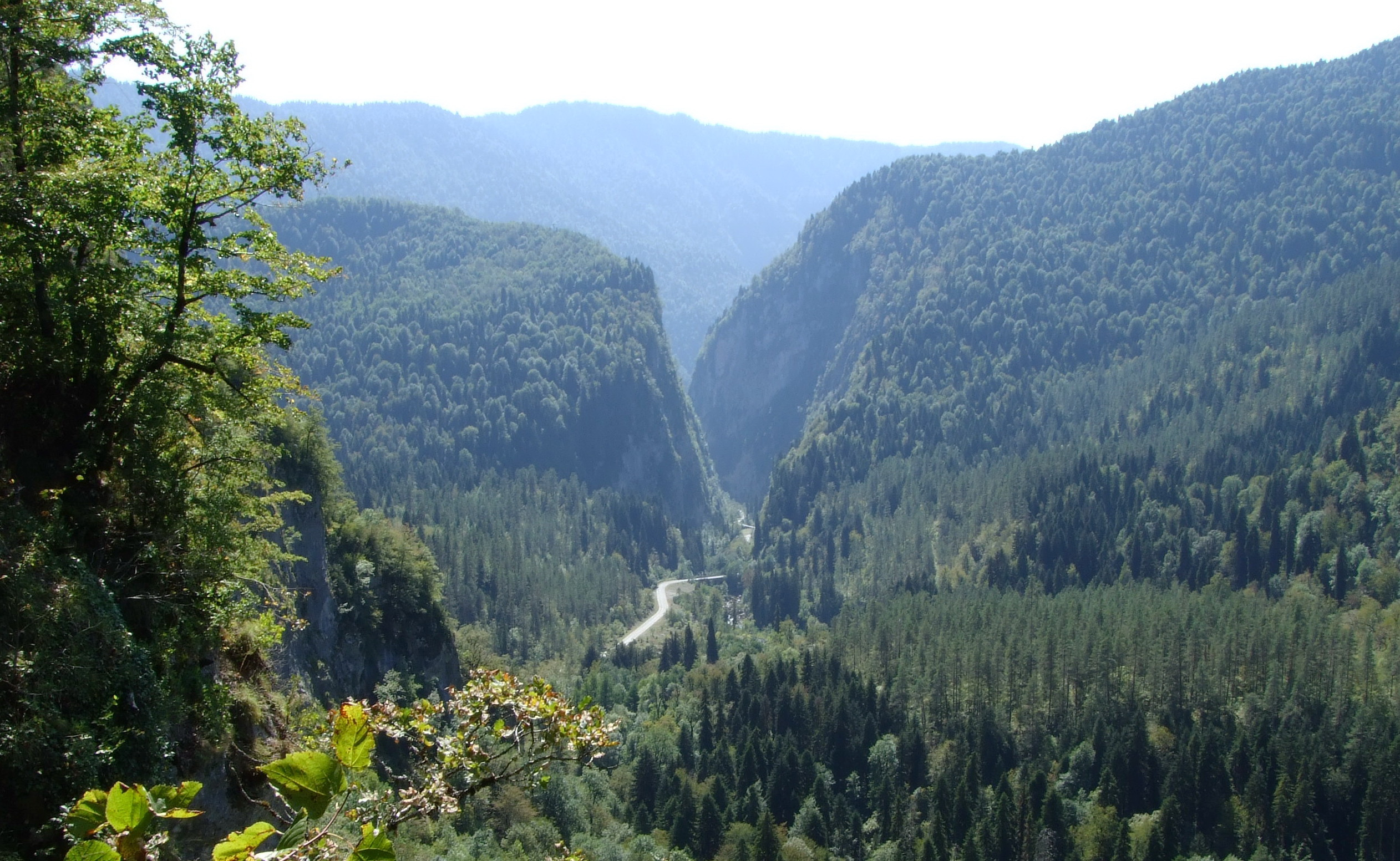 Уезжая с Рицы